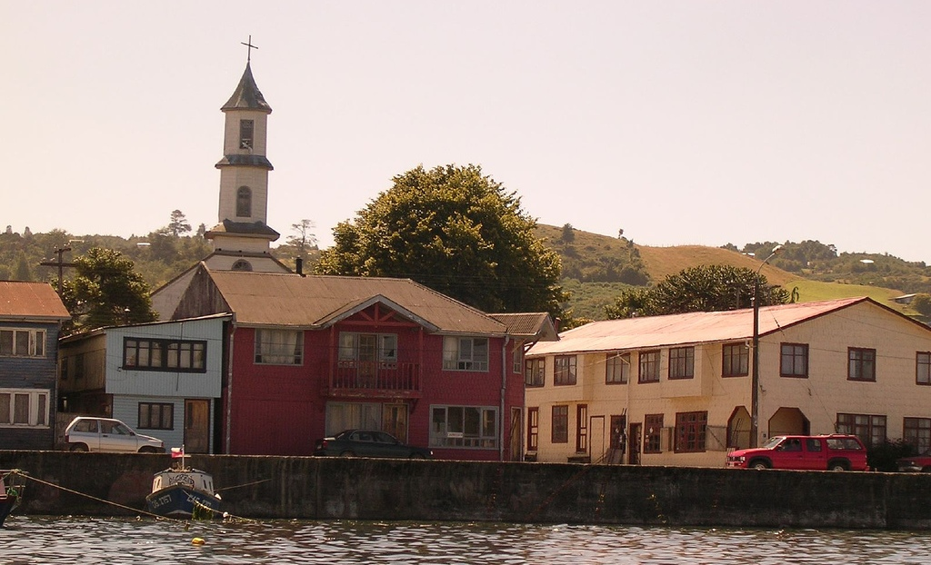 Costanera de Dalcahue frente a la Iglesia Nuestra Señora de los Dolores, en la isla de Chiloé (Chile)DSCN9792